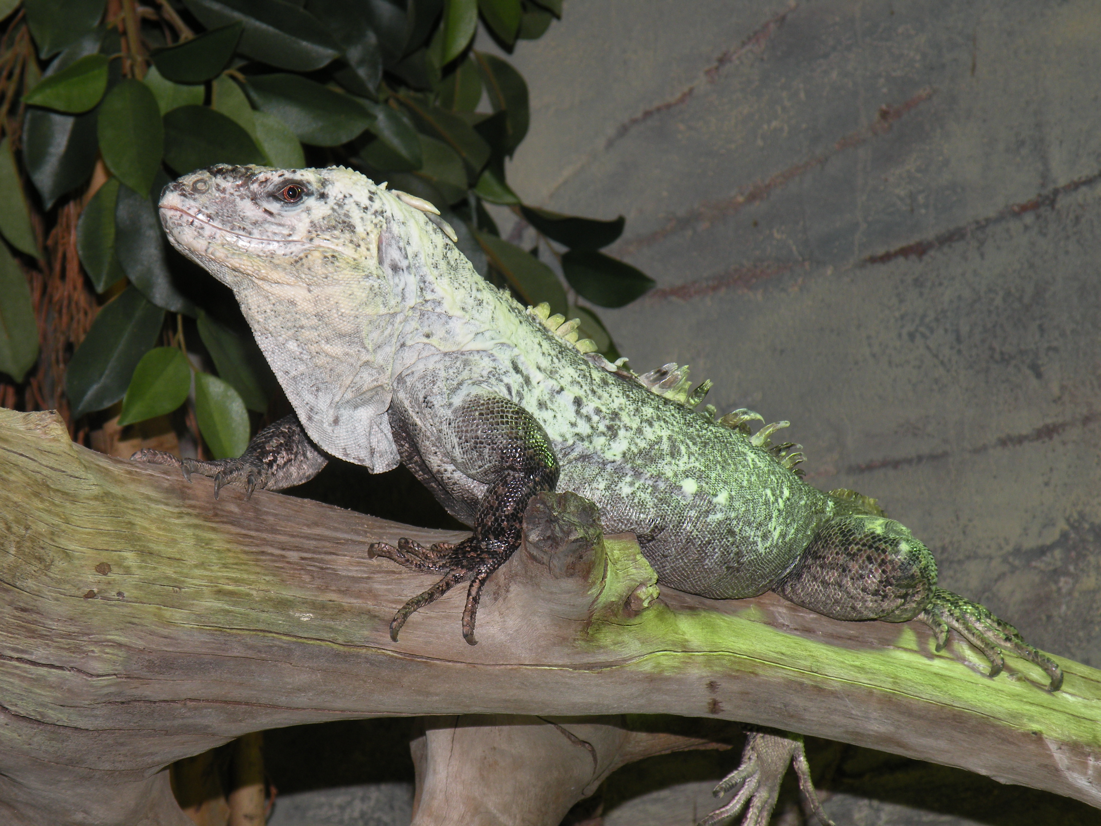 A Utila iguana (Ctenosaura bakeri) in Diergaarde Blijdorp (Rotterdam Zoo)